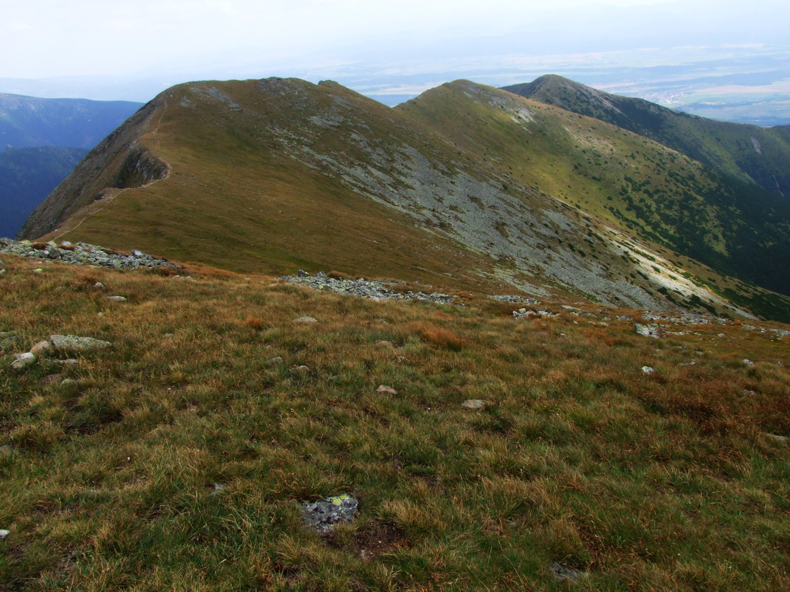 Baraniec (West Tatra Mountains)